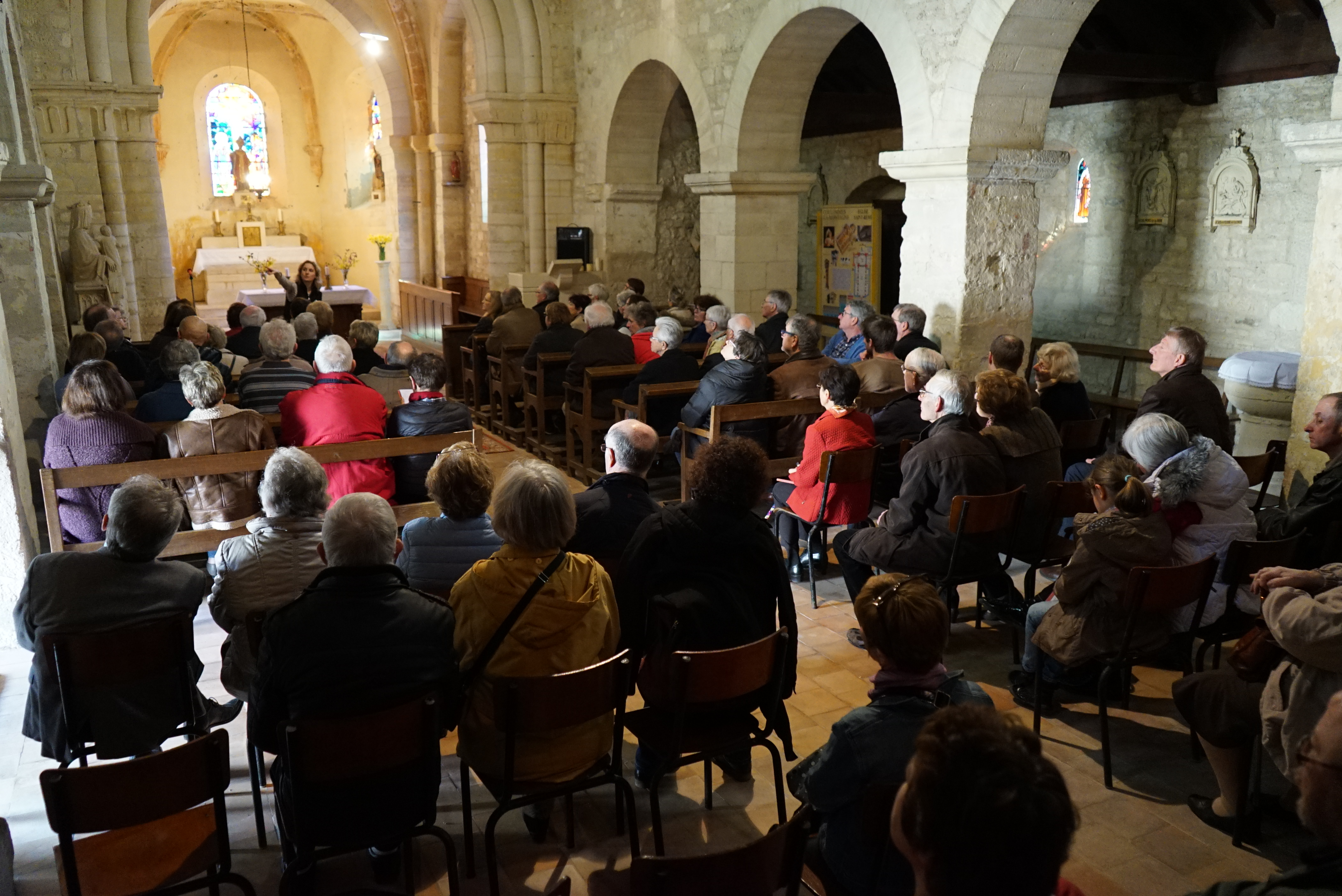 intérieur de l'eglise saint-remi de coulommes la montagne lors d'une activité organisée par le parc naturel regional de la montagne de reims.